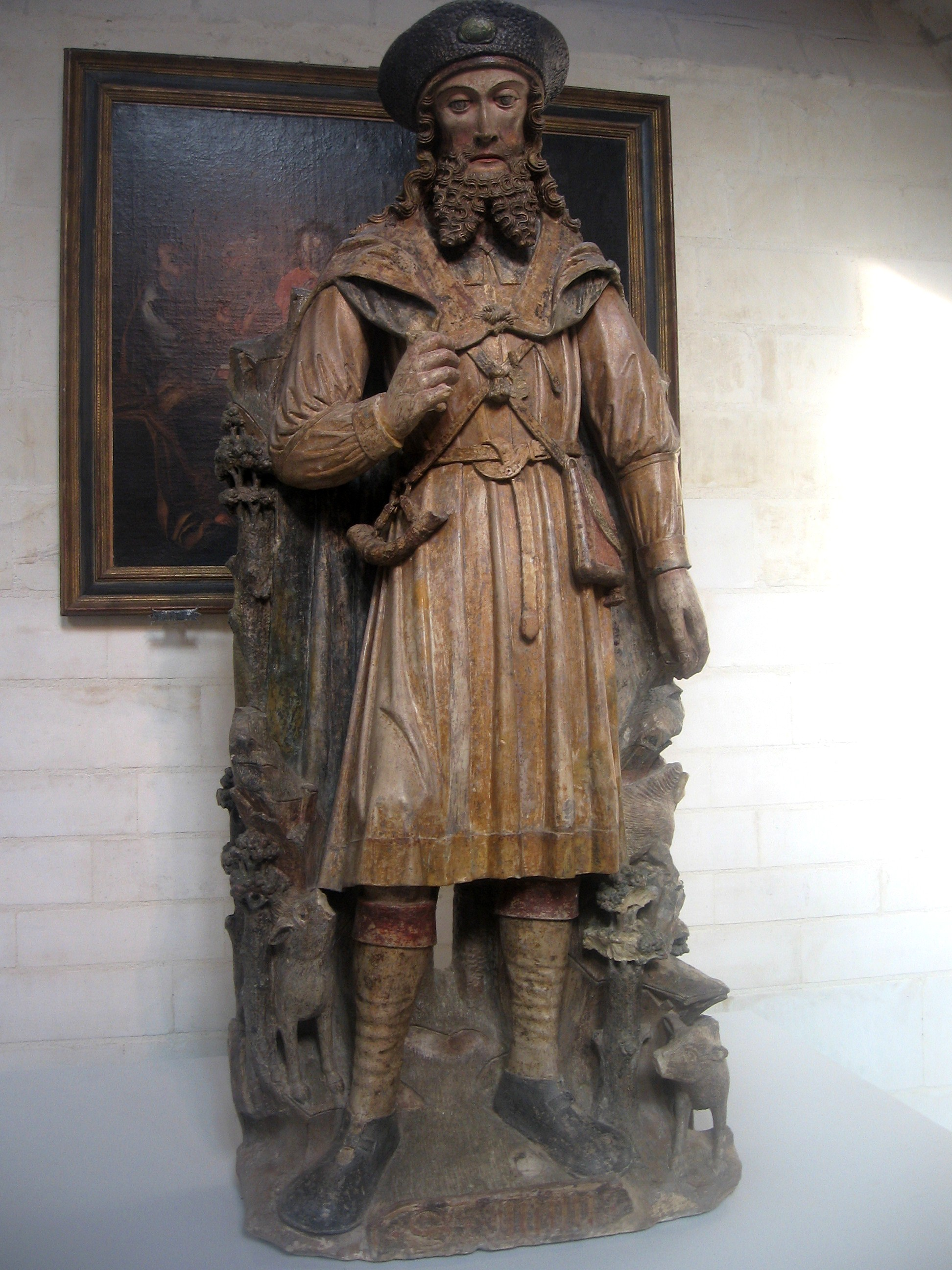 Exposition "Le Beau XVIe siècle". Saint Juvin Vers 1510-1520 Statue, calcaire polychromé Saint Juvin (Ardennes) - Classé monument historique le 08.05.1939